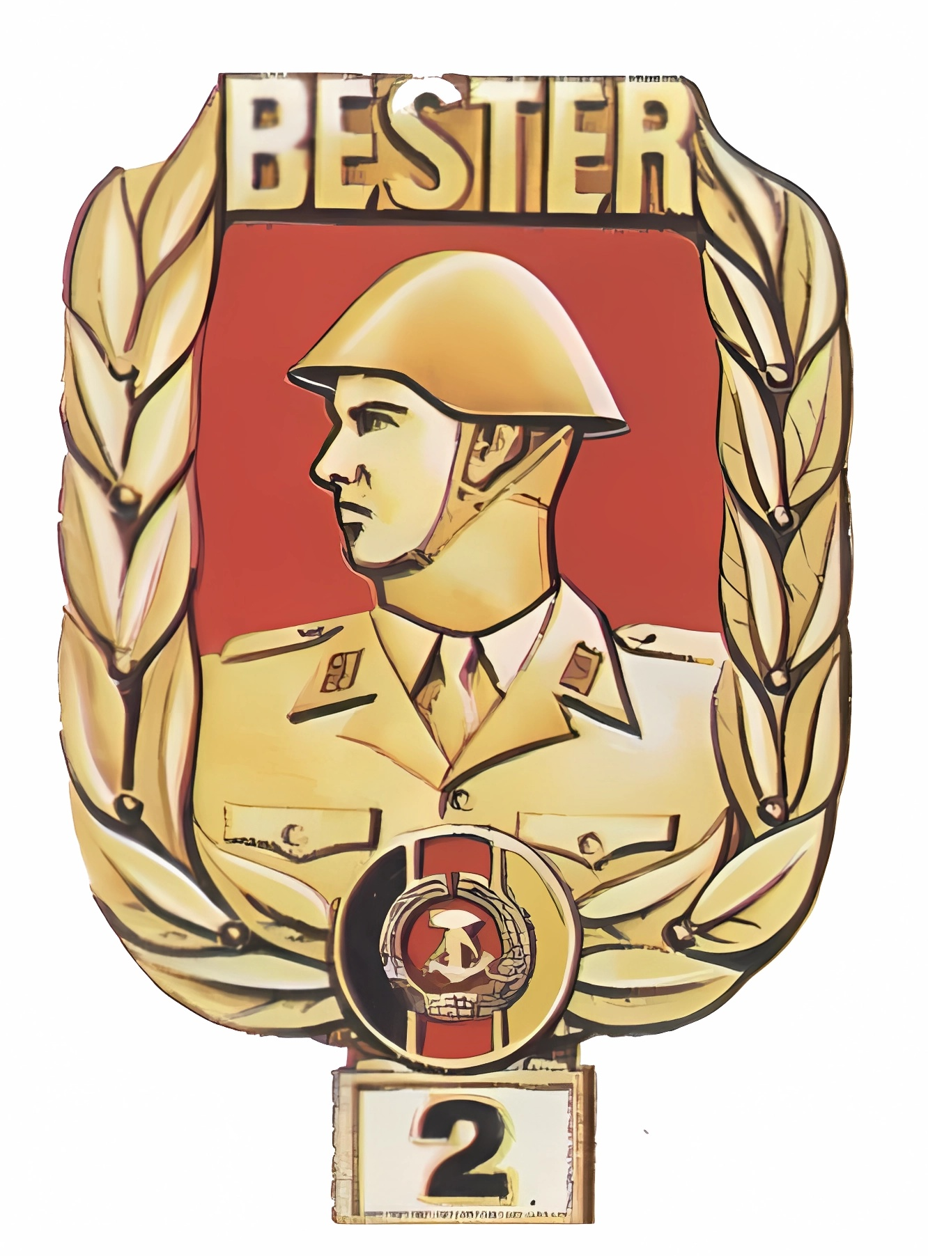 Geplantes Bestenabzeichen der NVA, 1984